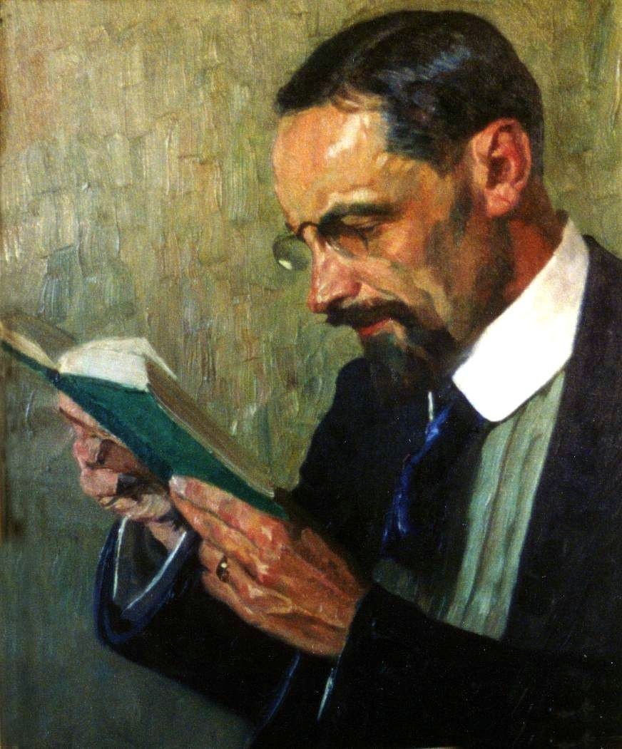 Selbstbildnis des Malers Felix Schuchard, Öl, Eisenach um 1910